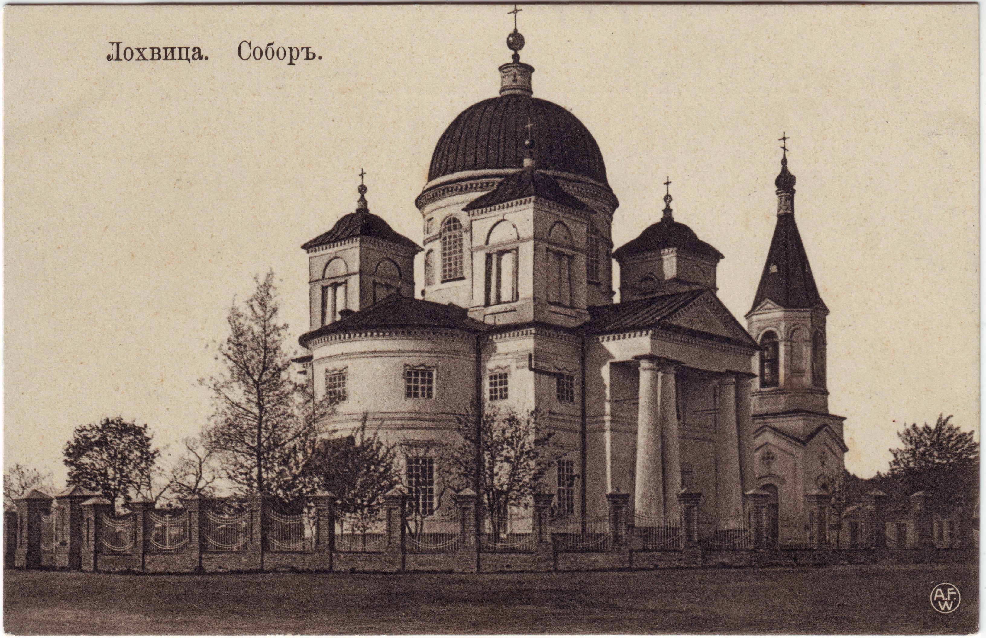 Собор Різдва Пресвятої Богородиці у м. Лохвиця. Побудовано у 1800-1806 р.р. Зруйновано у 1930-х роках. Знаходився неподалік від Кам'яних рядів на Соборній площі(зараз вул. Гоголя).